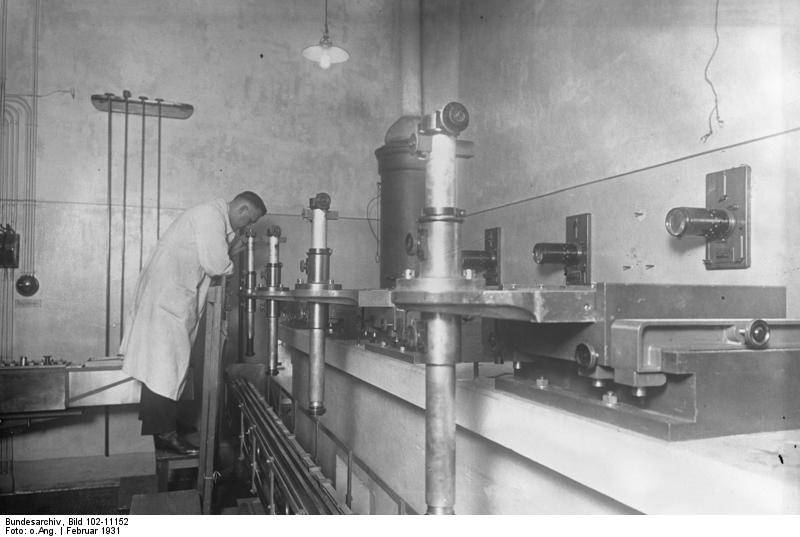 Interessante Aufnahmen aus der deutschen Reichsanstalt für Maß und Gewicht! An dem 4 m-Komperator wird der Normalmassstab des Brunner'schen Basis-Apparates gleichfalls mit einem 4 m-Normalstab verglichen. Letzterer wird dann wieder unter dem Mikroskopen von Meter zu Meter mit dem deutschen Meterurmaß ausgemessen.